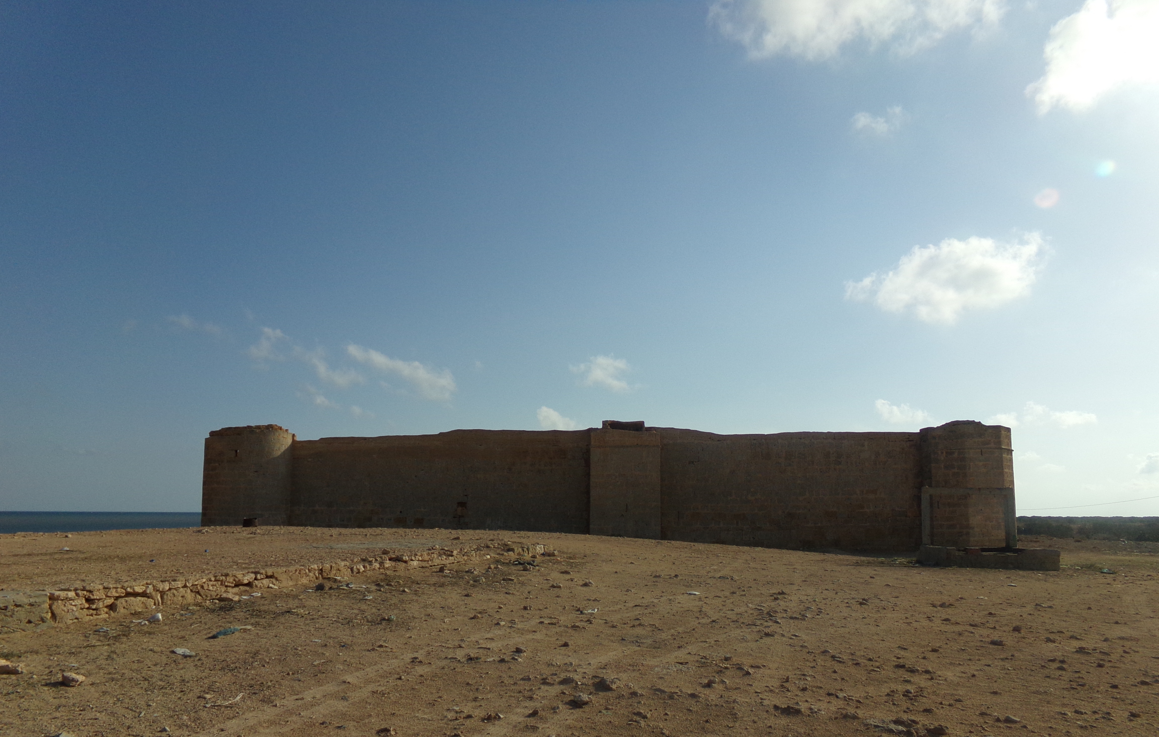 Forteresse byzantine